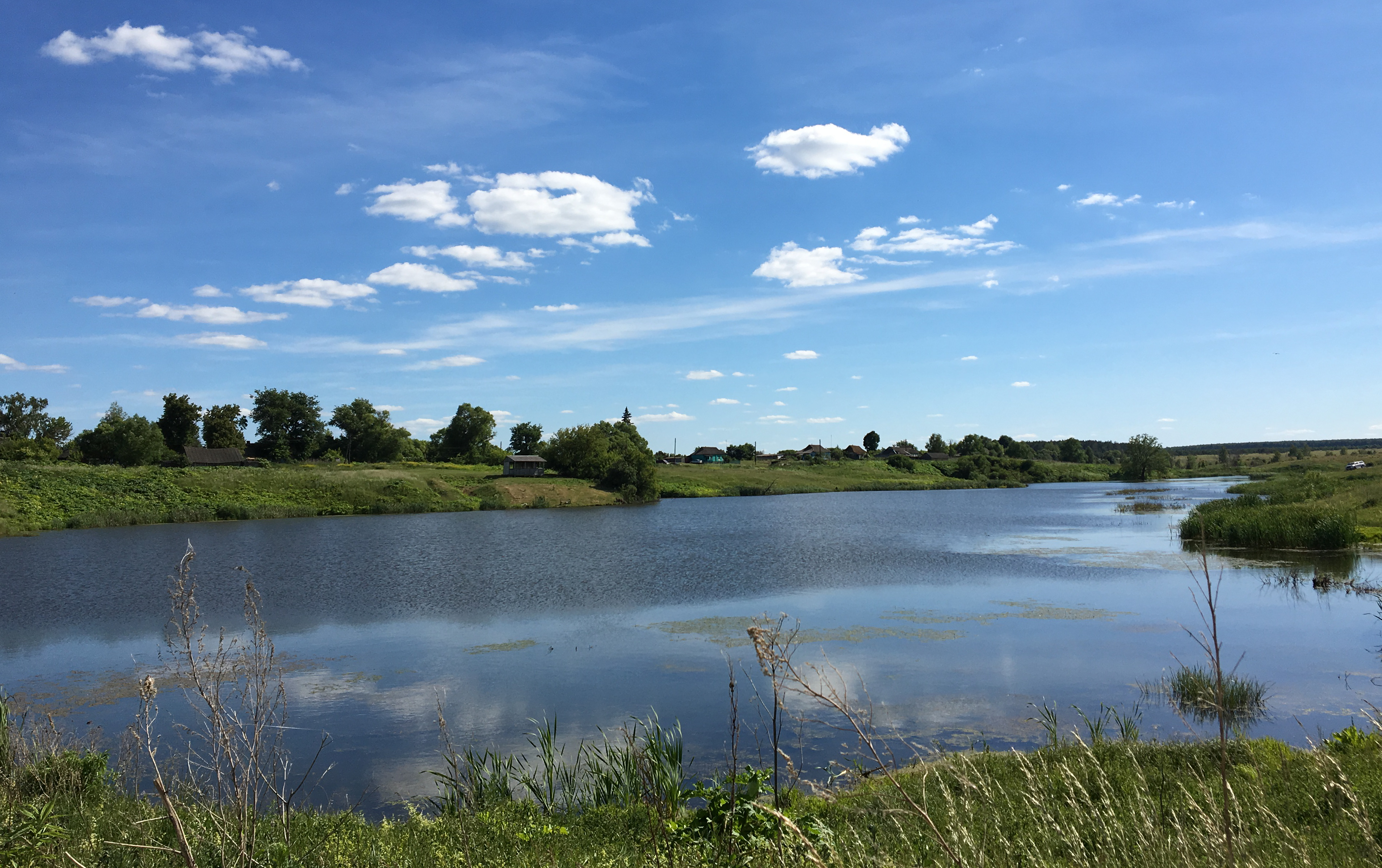 Пруд на Радубежском ручье в деревне Подымовка